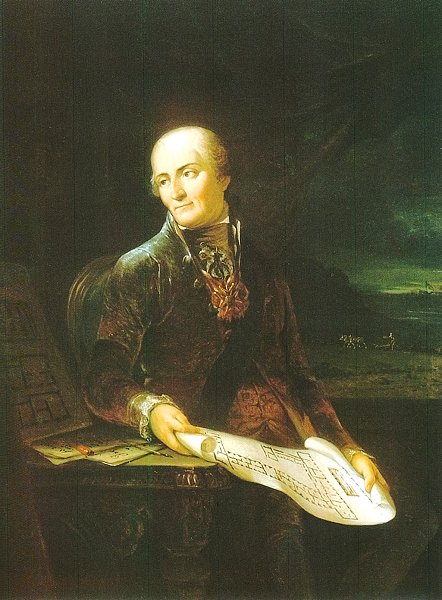 Беларуская (тарашкевіца): Партрэт Антонія Тызэнгаўза